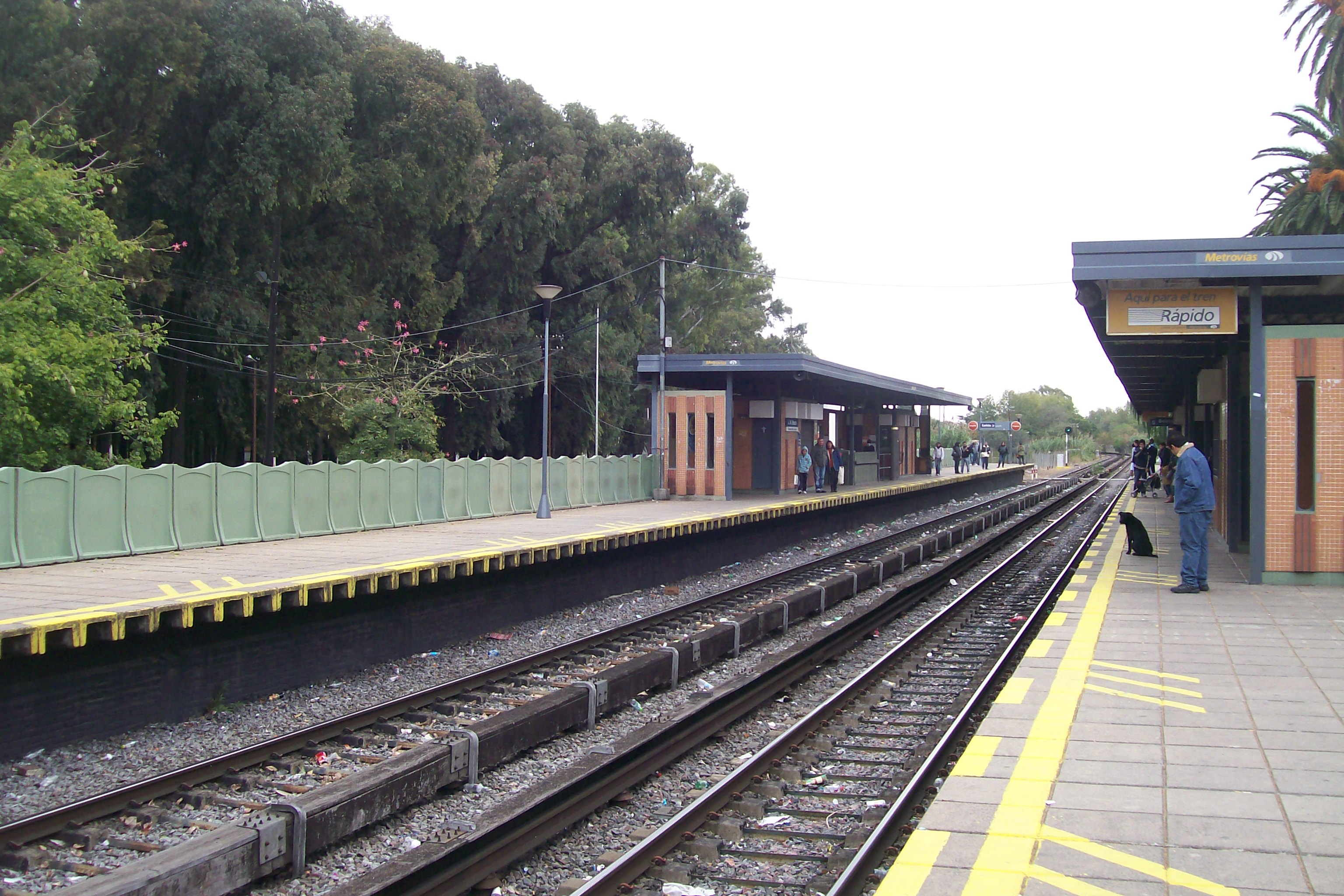 Estación de Villa Bosch